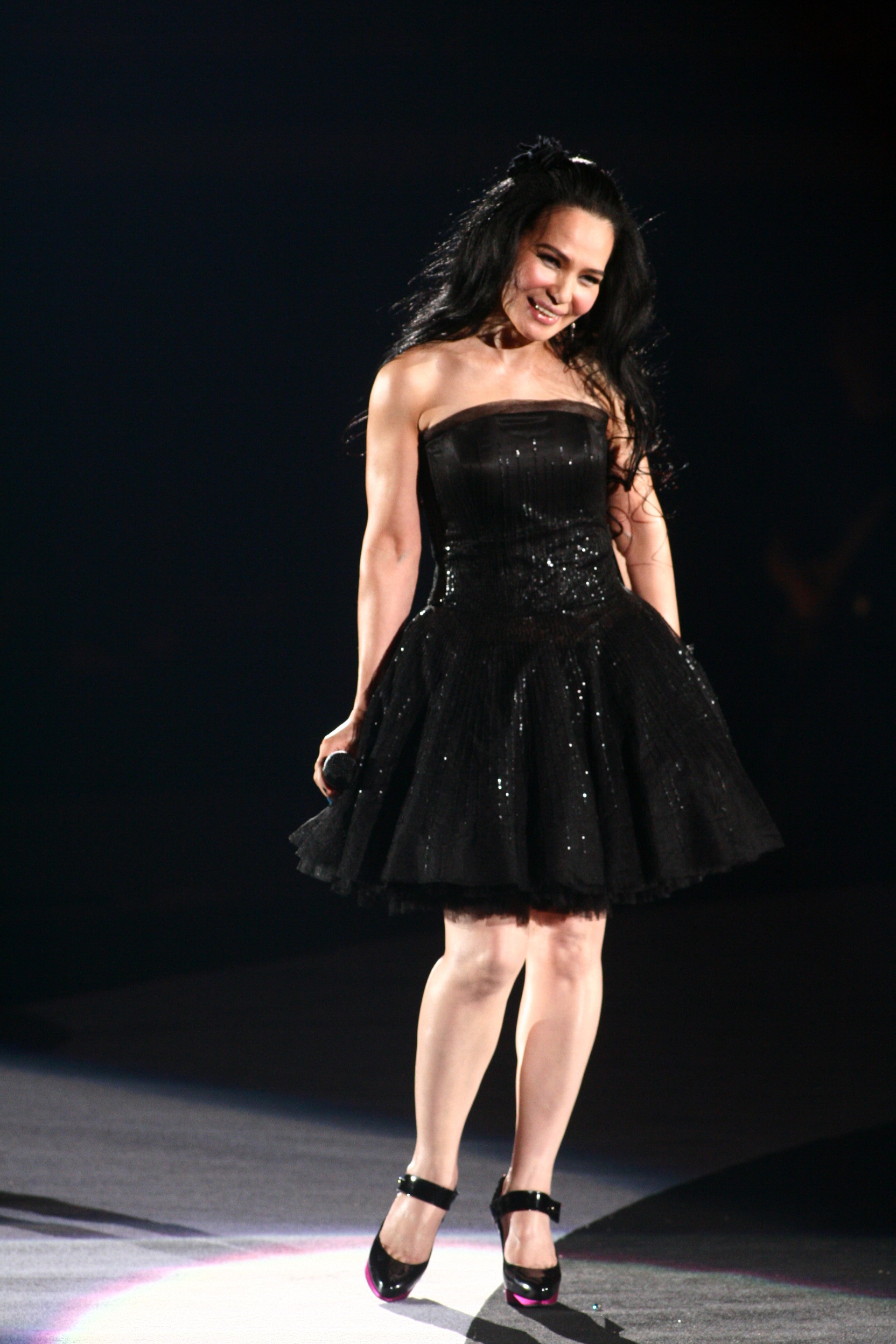 潘越雲出席滾石唱片30周年演唱會。